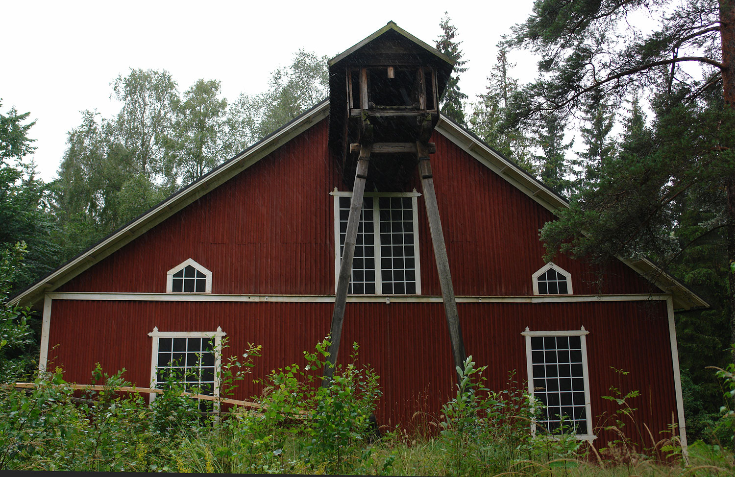 Das Polhemsrad (Polhemshjulet) ist ein Wasserrad, das in der schwedischen Bergwerksregion Bergslagen (nahe Norberg) von 1876 bis 1920 Teil eines Antriebsystems zur Entwässerung von Erzgruben war. Foto: Gerinne